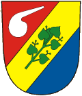 Znak města Neratovice